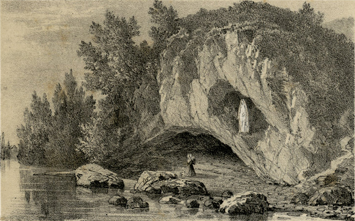 Gravure de Charles Mercereau (1822-1864)